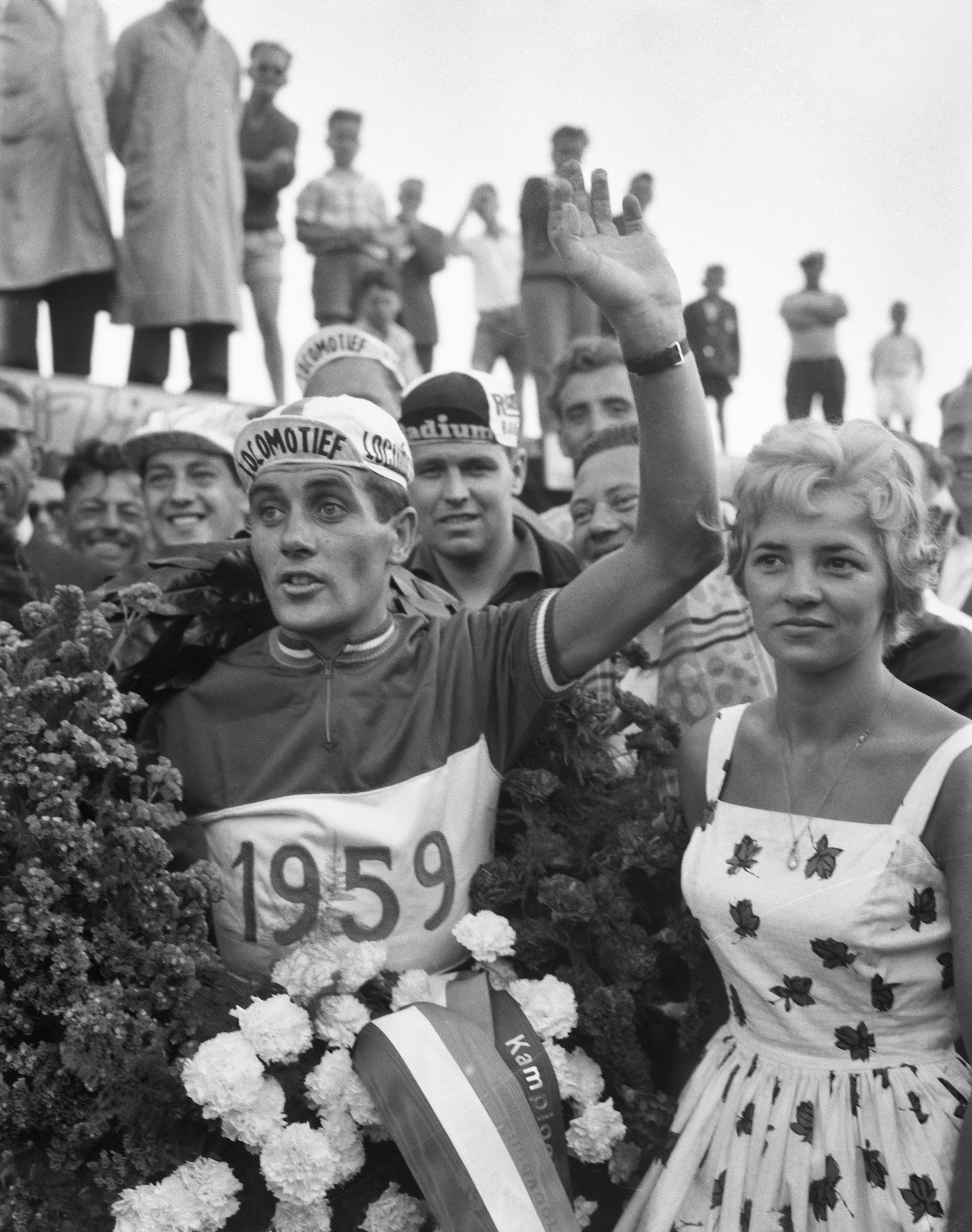 Laatste rit om het kampioenschap van het kampioenschap wielrennen op de weg voor profs op het circuit van Zandvoort, Piet Damen met krans bij de huldiging. Datum 26 juli 1959